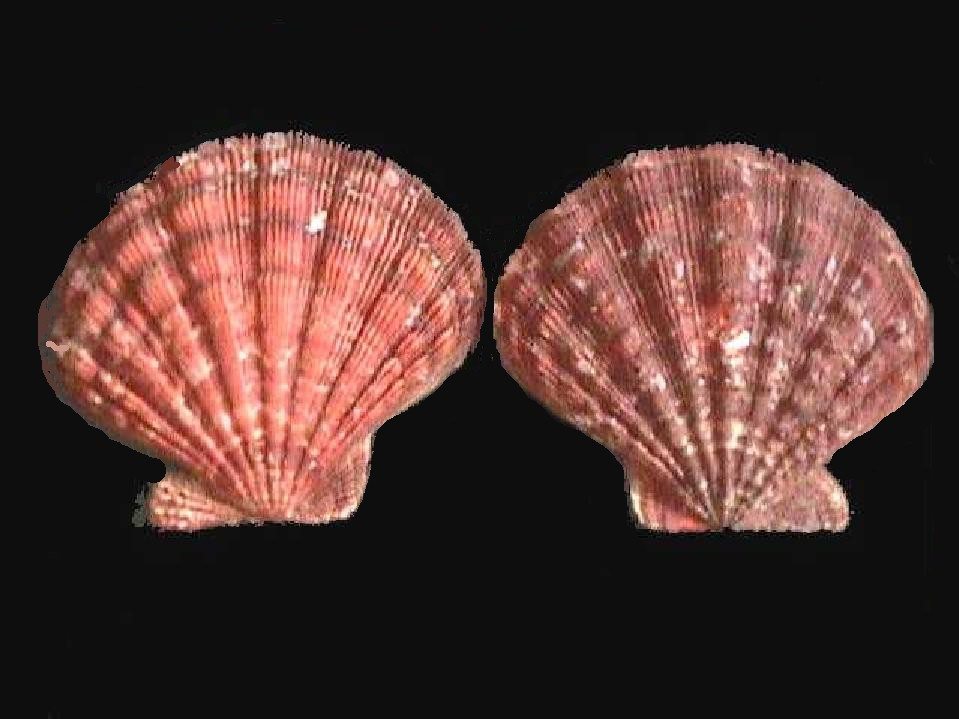 Lyropecten nodosus de Bahia de Mochima, Estado Sucre - Venezuela